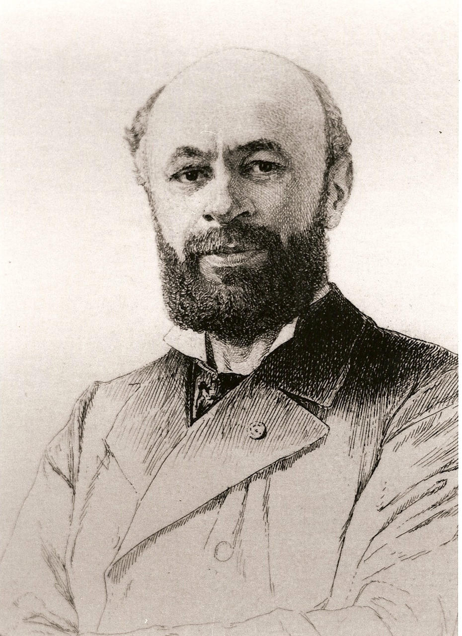 Gravure représentant Louis Herbette vers 1895